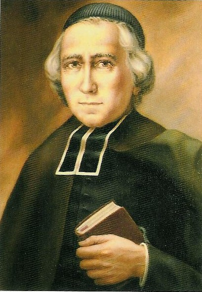 Guillaume-Joseph Chaminade, peint par le peintre marianiste Joseph Vabre en 1954. L'original se trouve à Paris.